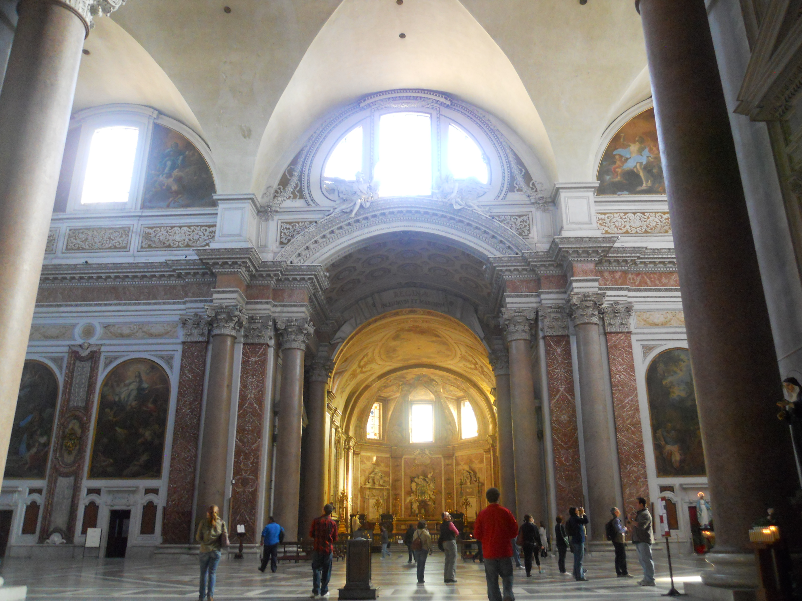 Santa Maria degli Angeli e dei Martiri